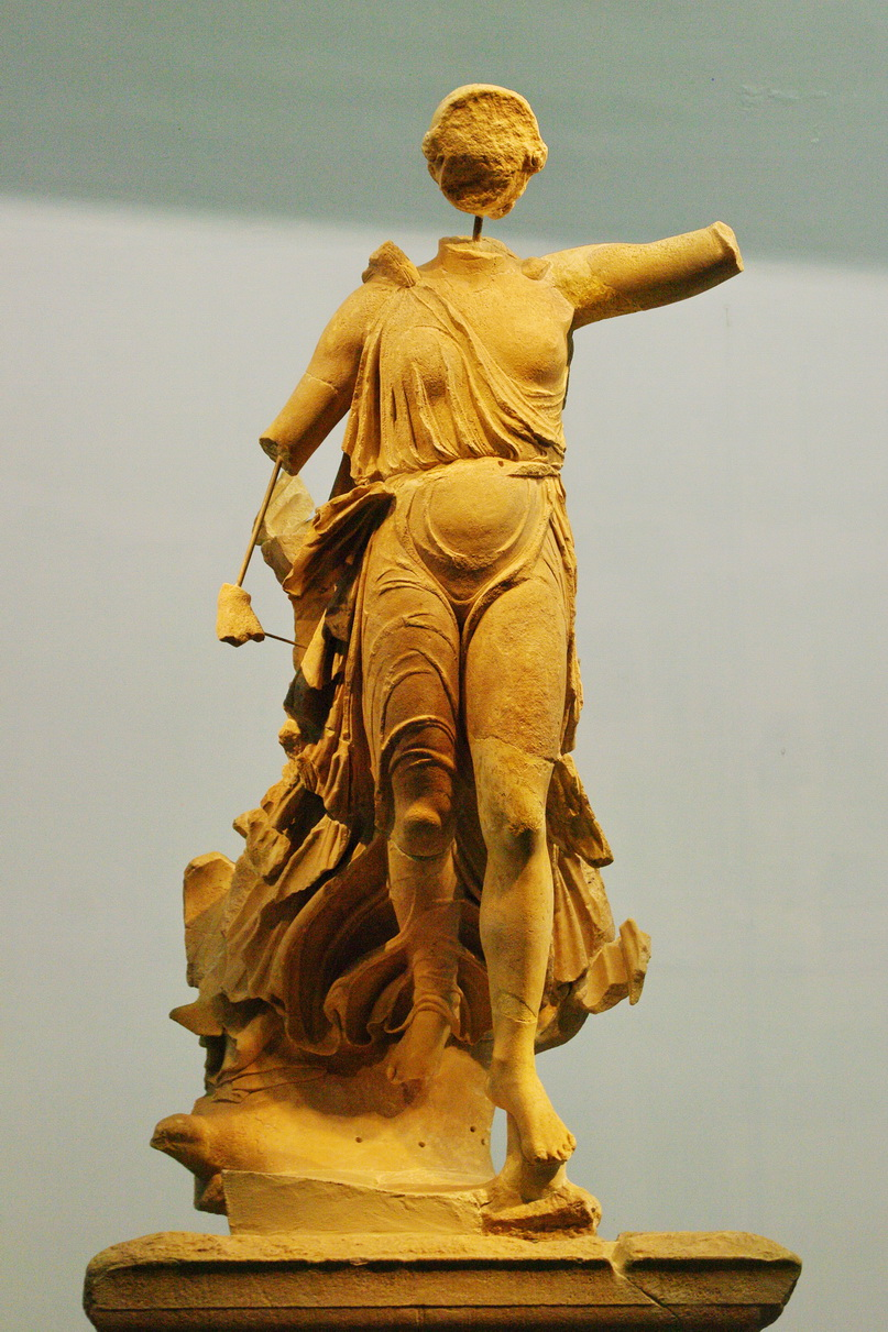 Museum Olympia: Nike des Panoios